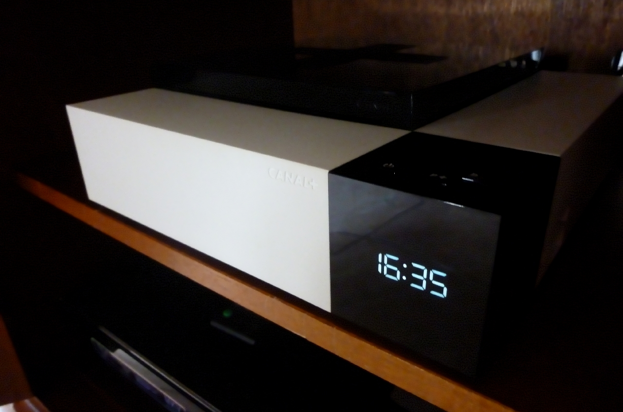 Le décodeur G5 aussi connu sous le nom de "décodeur hd wifi" du fait de son module wifi intégrée, est un récepteur/décodeur compatible haute définition et 3d de télévision et services multimédias adapté à la télédiffusion numérique par satellite exploité par les chaînes à péage du groupe Canal+.